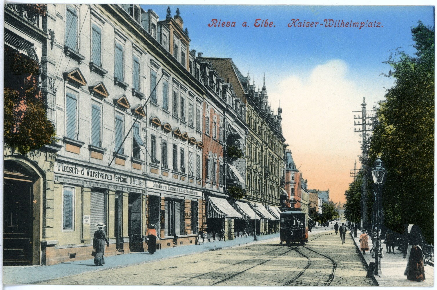 Riesa; Kaiser-Wilhelm-Platz This postcard is from publisher Brück & Sohn in Meißen ( postcard has a unique number 18184 and is available in a higher resolution at the publisher. This images was uploaded in a cooperation project between Wikipedians and the publisher.